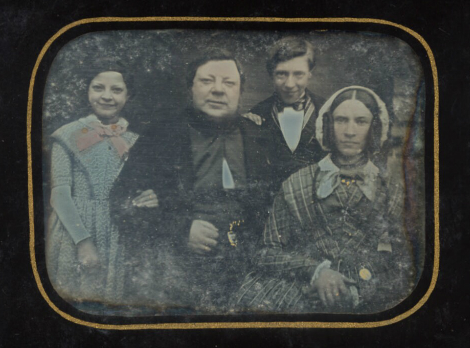 V.l.n.r. Anna Charlotte van Riemsdijk (1839-1911), Cornelis Johannes van Riemsdijk (1810-1881), Otto van Riemsdijk (1835-1898) en Carolina Johanna Crull (1815-1866)